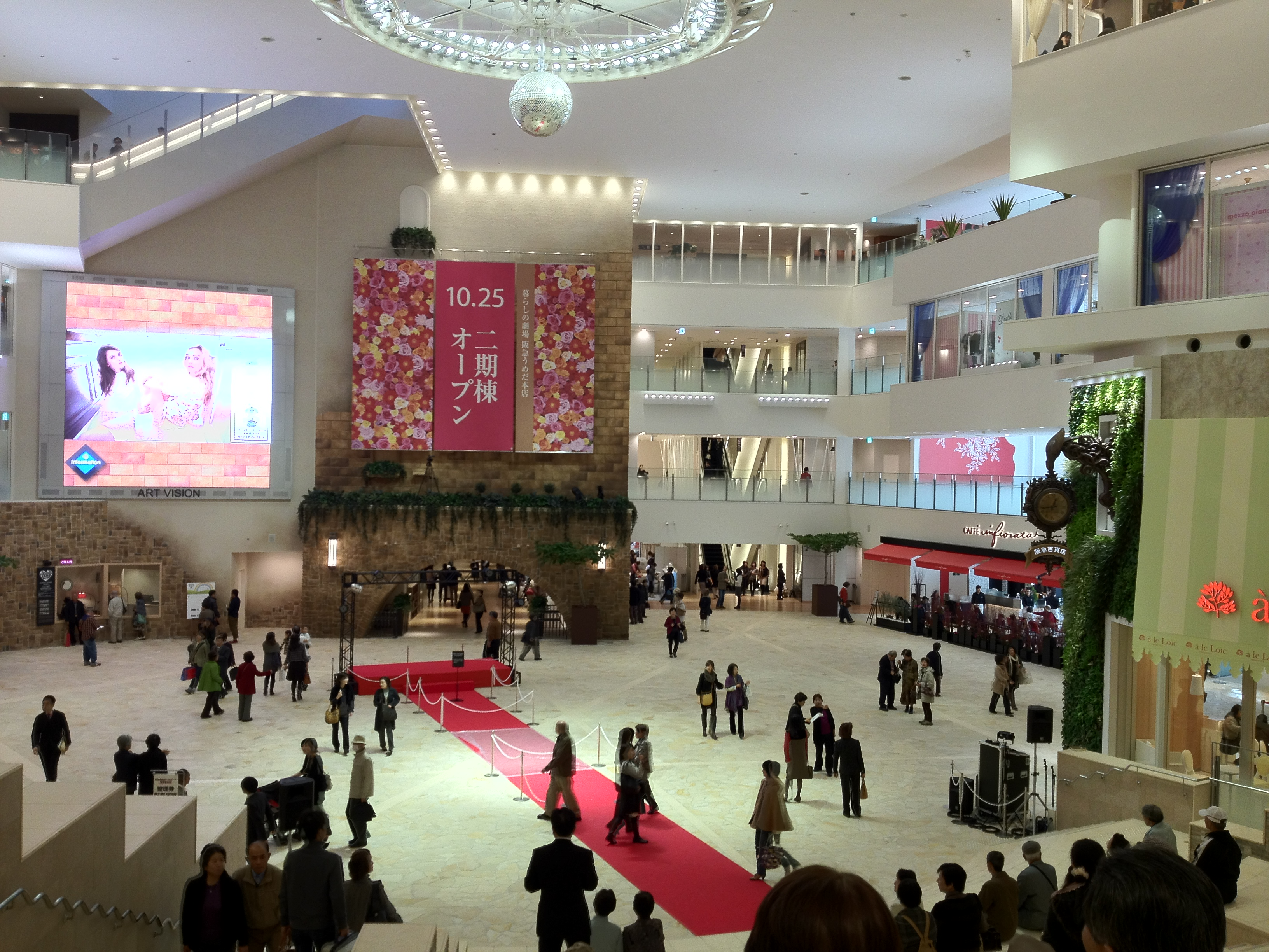 阪急うめだ本店 祝祭広場